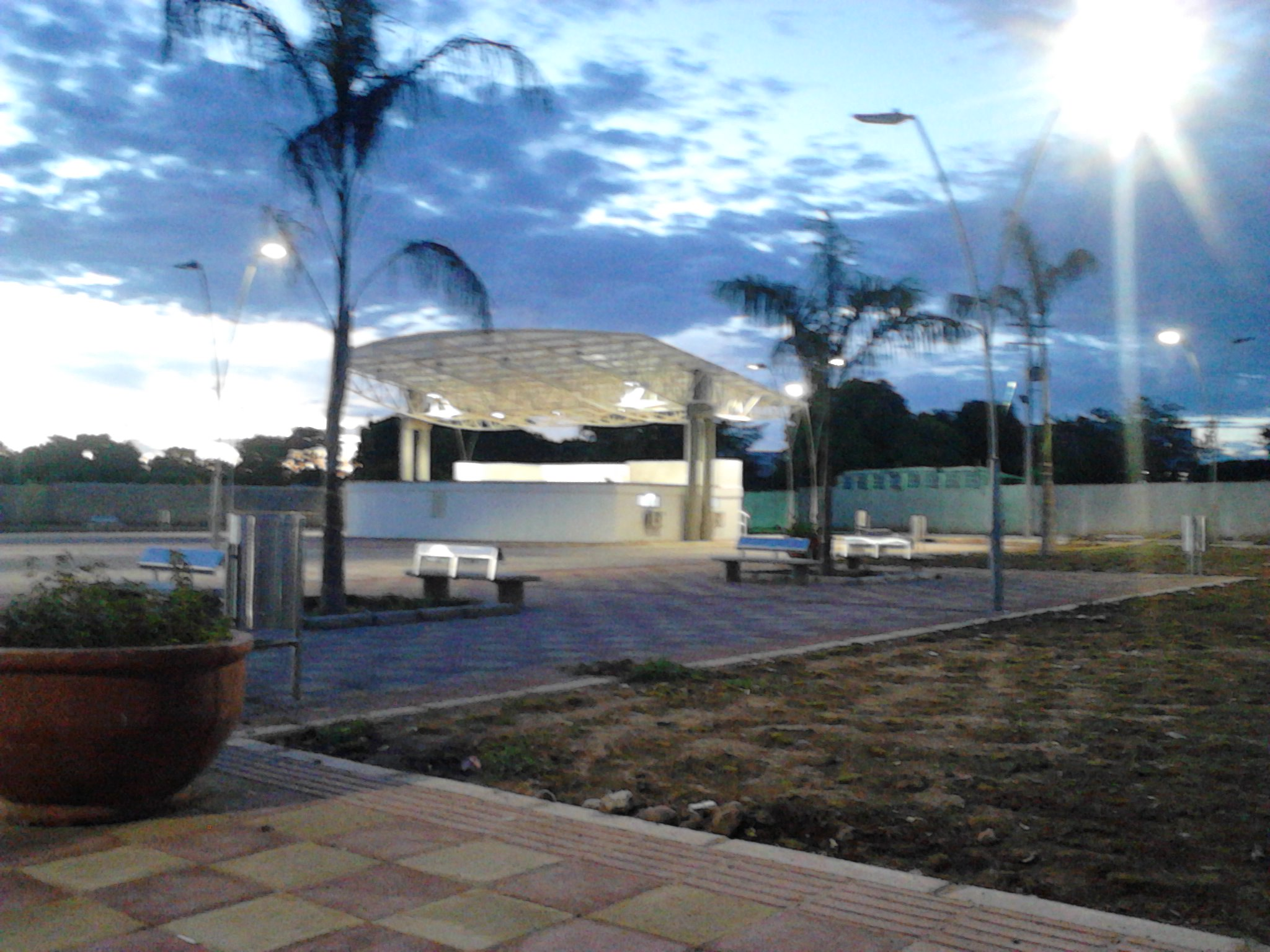 Tarima principal del parque de la guitarra en el municipio de Agustín Codazzi, cesar.